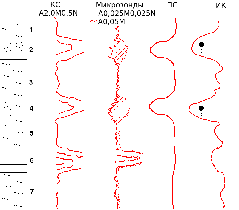 Сравнение показаний разных электрических методов на разрезе скважины